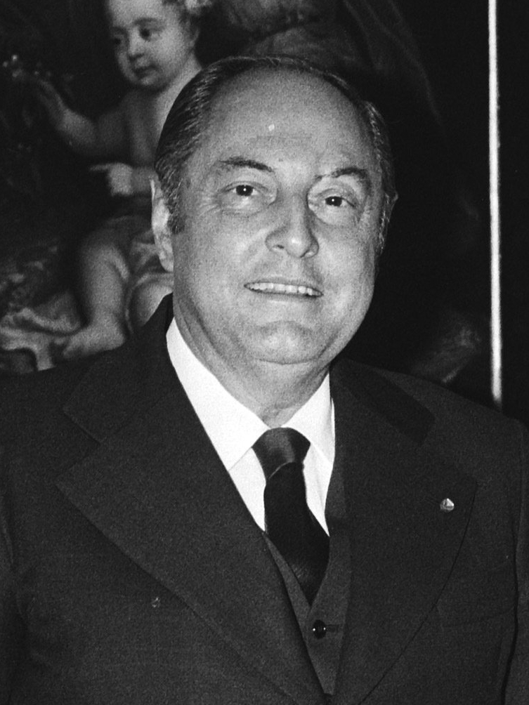 Koningin Beatrix ontvangt de vice-president van Brazilië Antonio Aureliano Chaves de Medonca en diens vrouw op Paleis Huis ten Bosch 4 oktober 1982